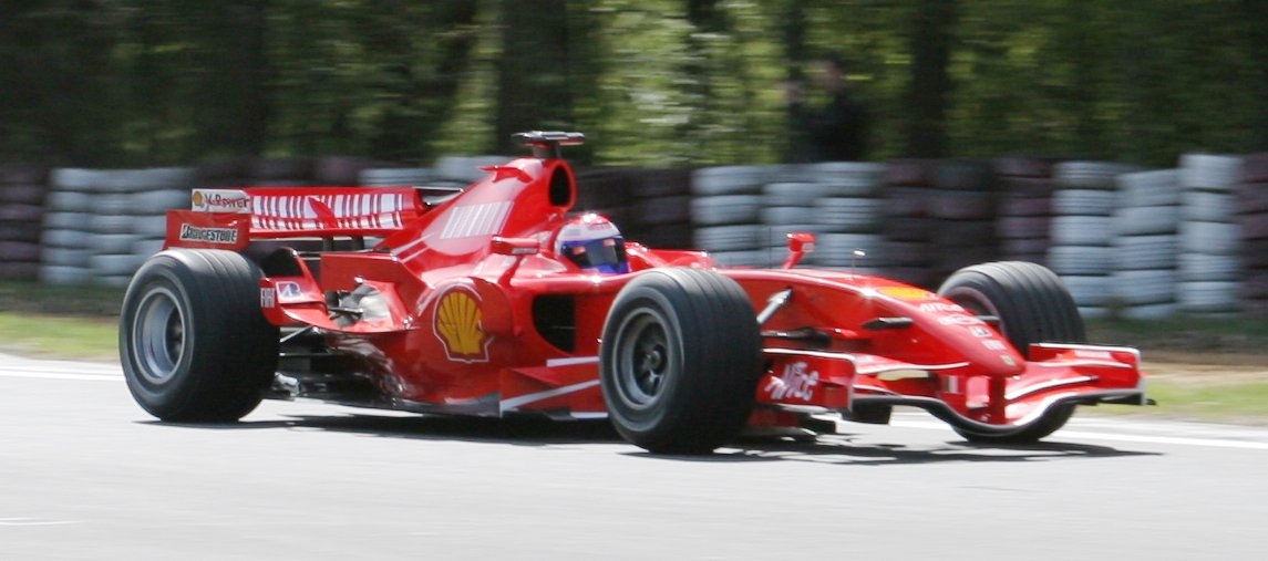 Ferrari F1 model 248F1(F2007's coloring) , Driver: Marc Gené (Ferrari F1 Team)